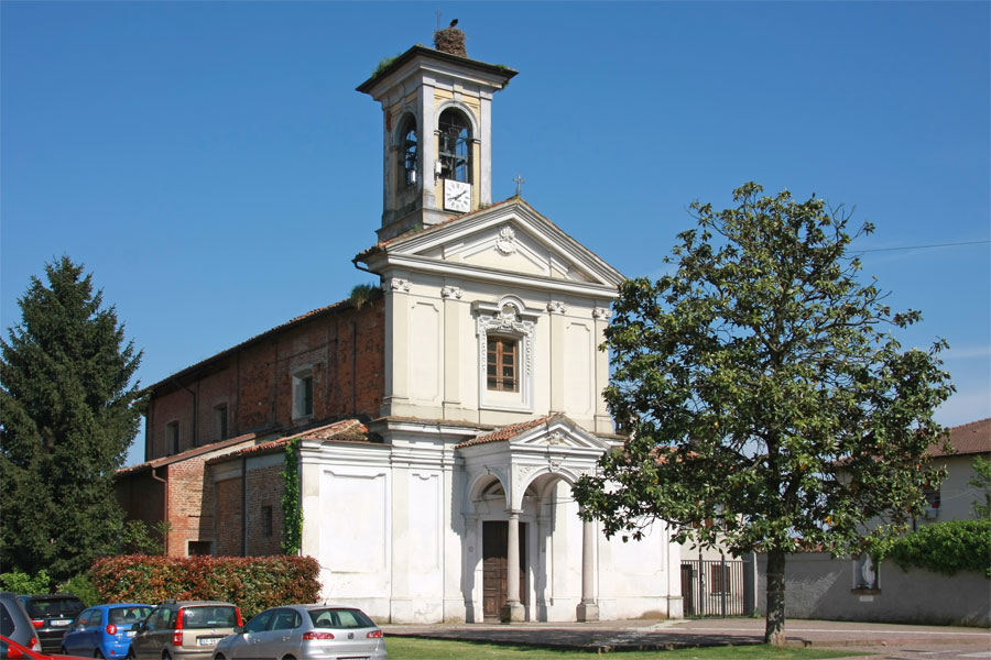 Chiesa parrocchiale di Sant'Alessio con Vialone